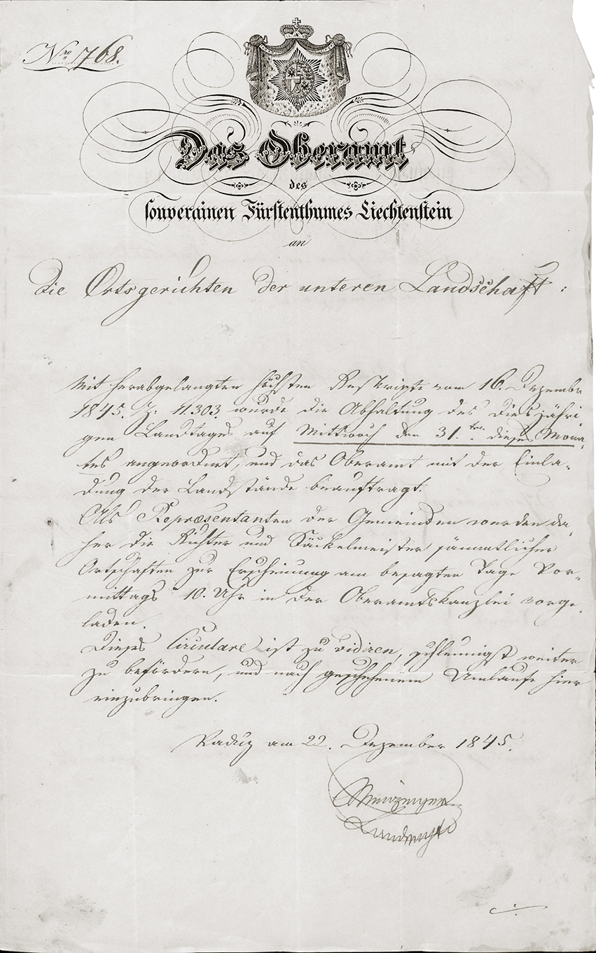 Briefpapier mit dem Staatswappen und dem offiziellen Titel des Oberamts Vaduz auf einem Zirkular an die Gemeinden des Unterlands.